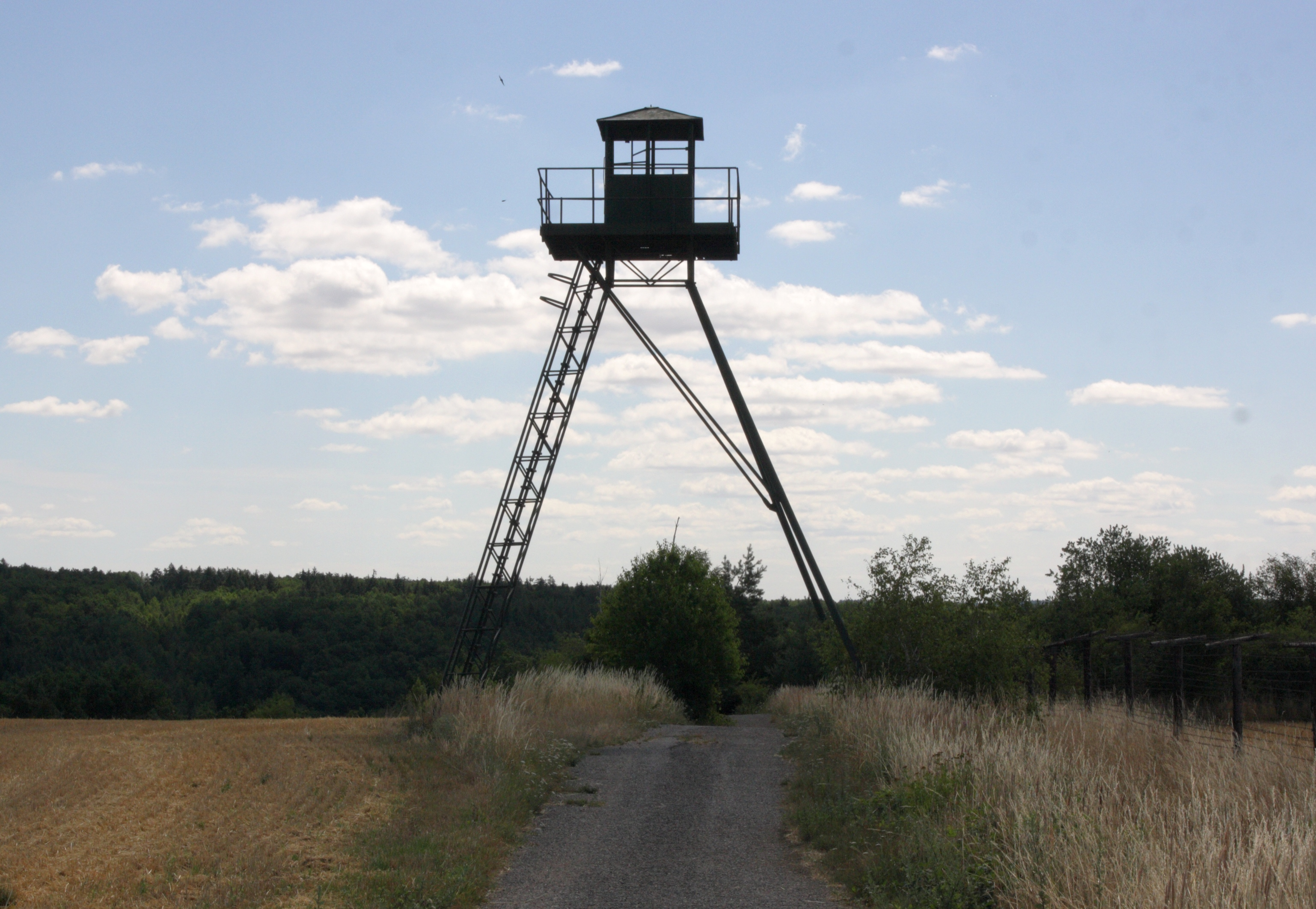 Čížov (Horní Břečkov) - bývalá strážní věž.